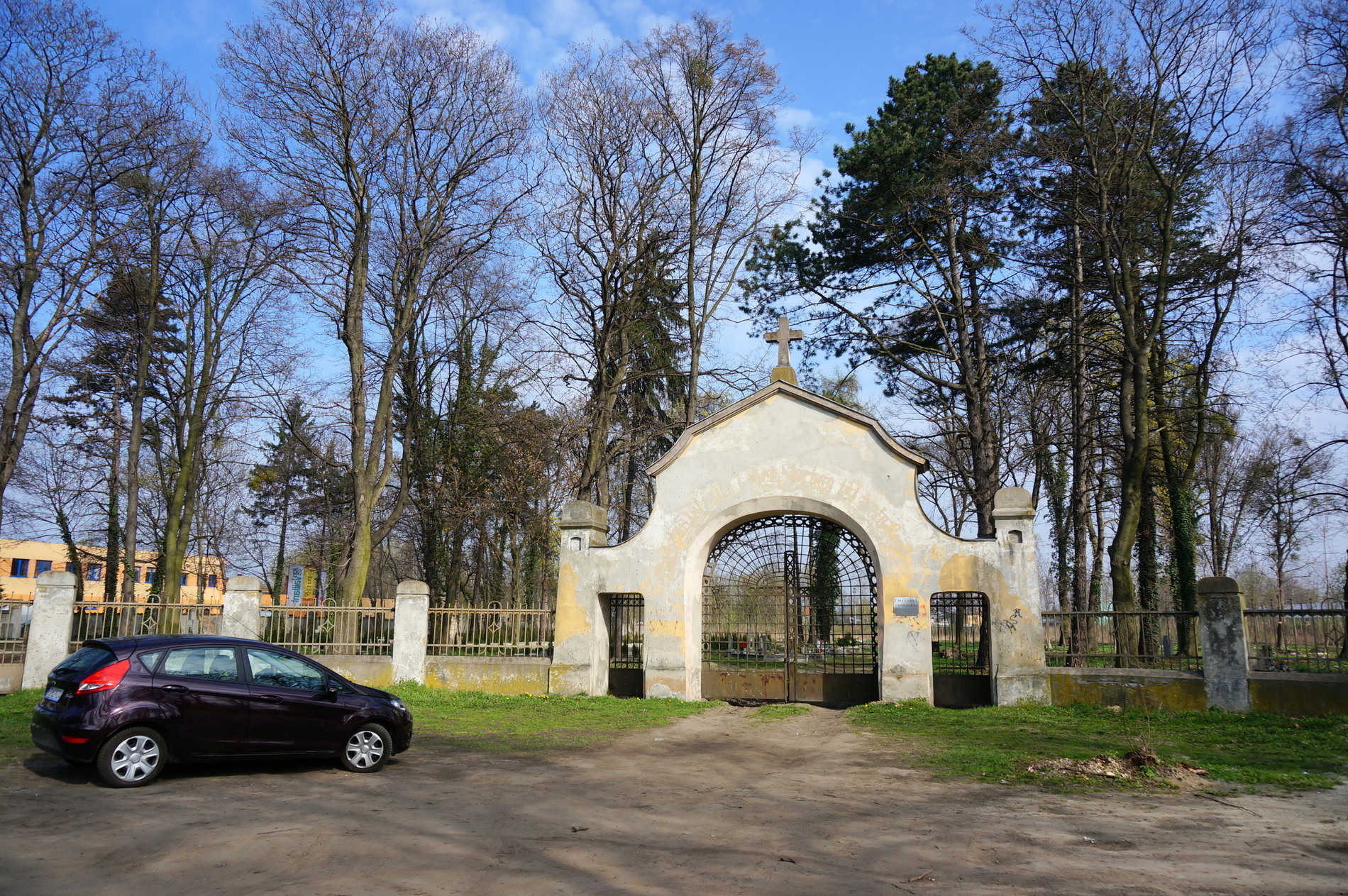 Ostrów Wlkp., ul. Grabowska. Cmentarz Parafii Ewangelicko-Augsburskiej (1911). Nekropolia ta kryje mogiły Niemców, Polaków, Ukraińców, Brytyjczyków i Rosjan m.in. gen. Władimira Iwanowicza barona Stael von Holstein (zm. w 1921) i biskupa Petera Haralda Poelchau z Łotwy (zm. w 1945).